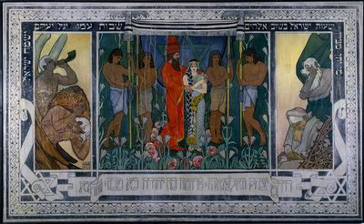 painting